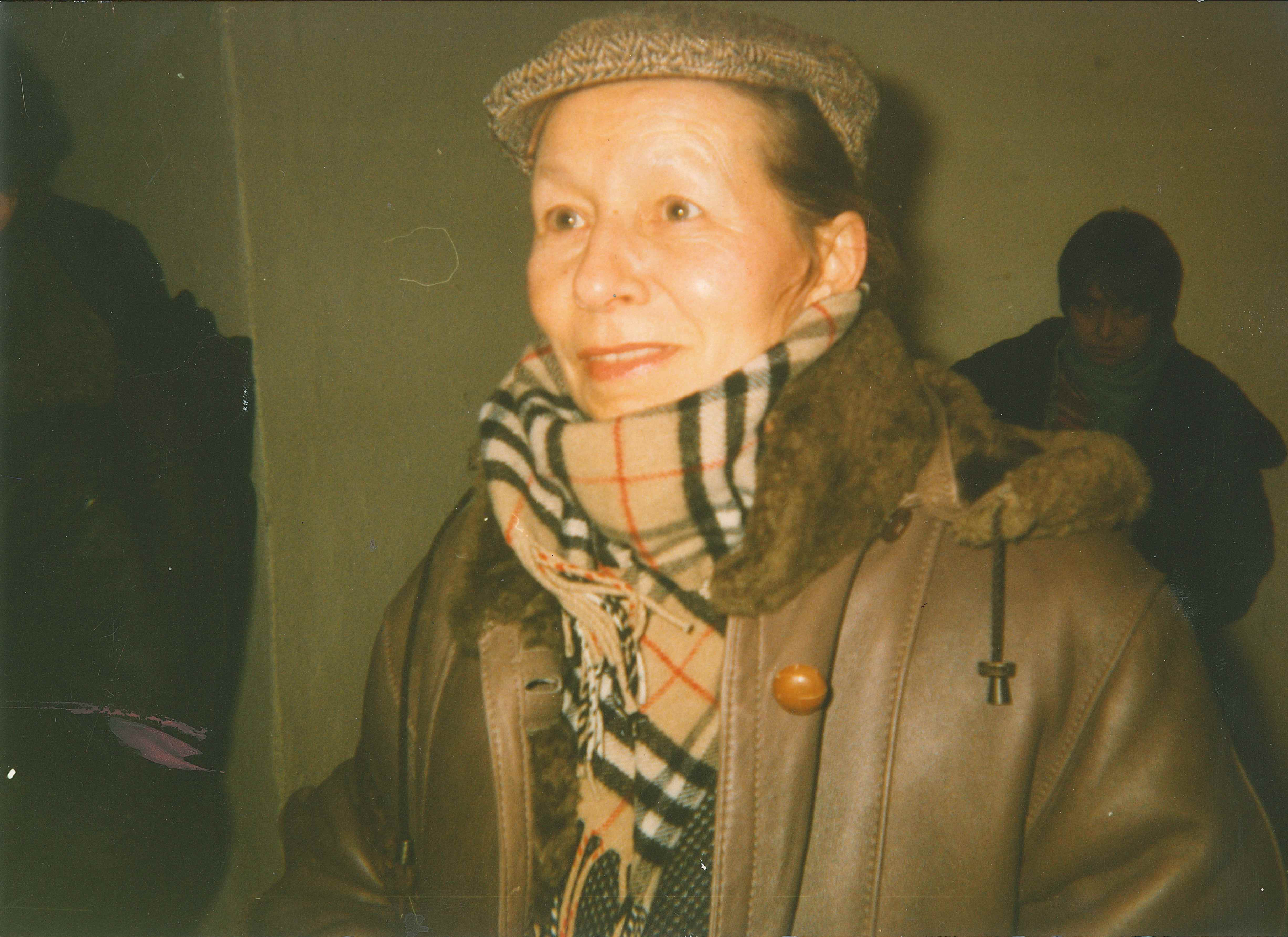 Фотопортрет Галины Осецимской, прототип портрета 1999 года Дмитрия Врубаля в соавторстве с Викторией Тимофеевой